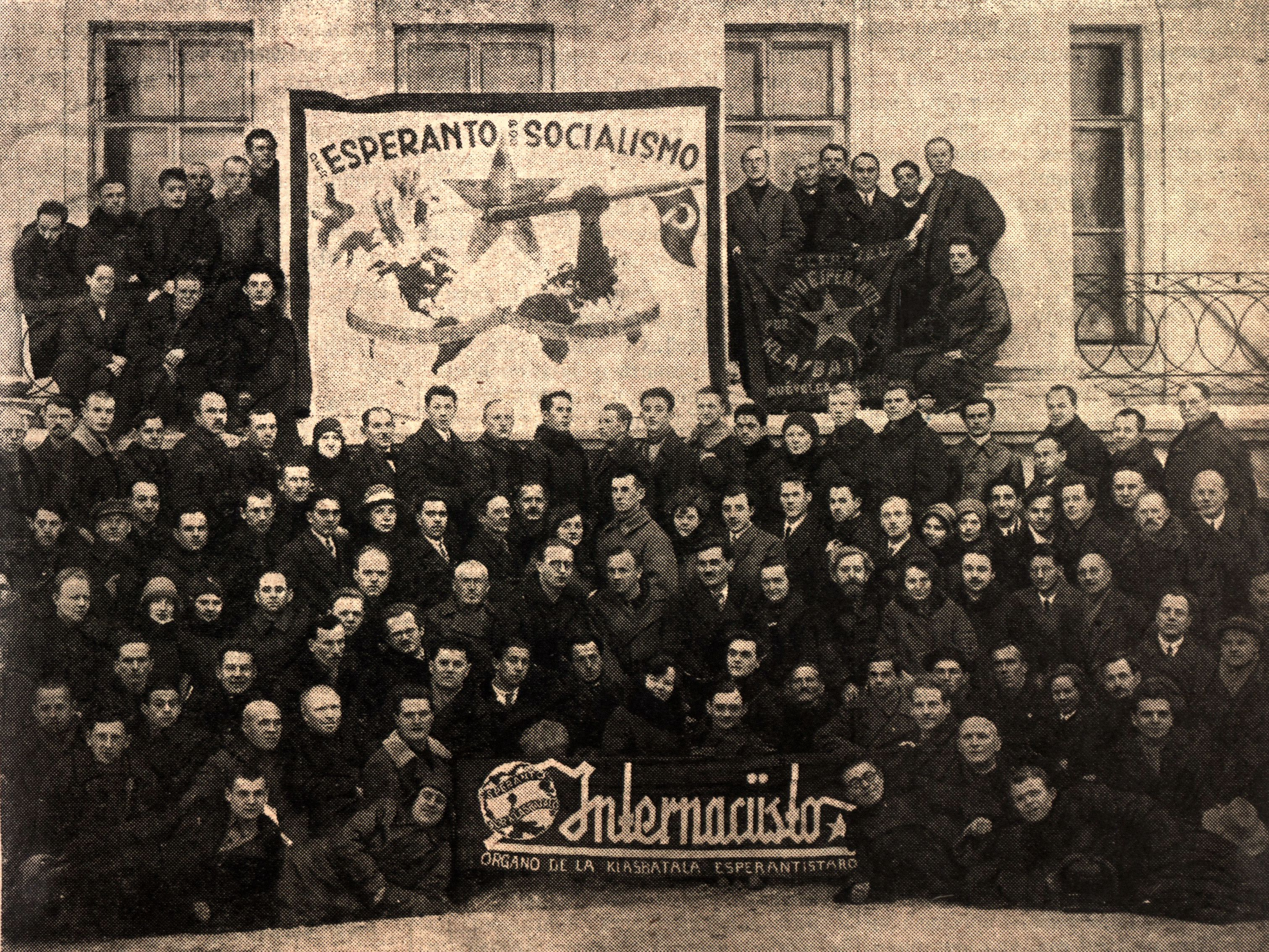 Partoprenantoj de la 5-a kongreso de SEU en Moskvo, 25-28 de novembro 1931